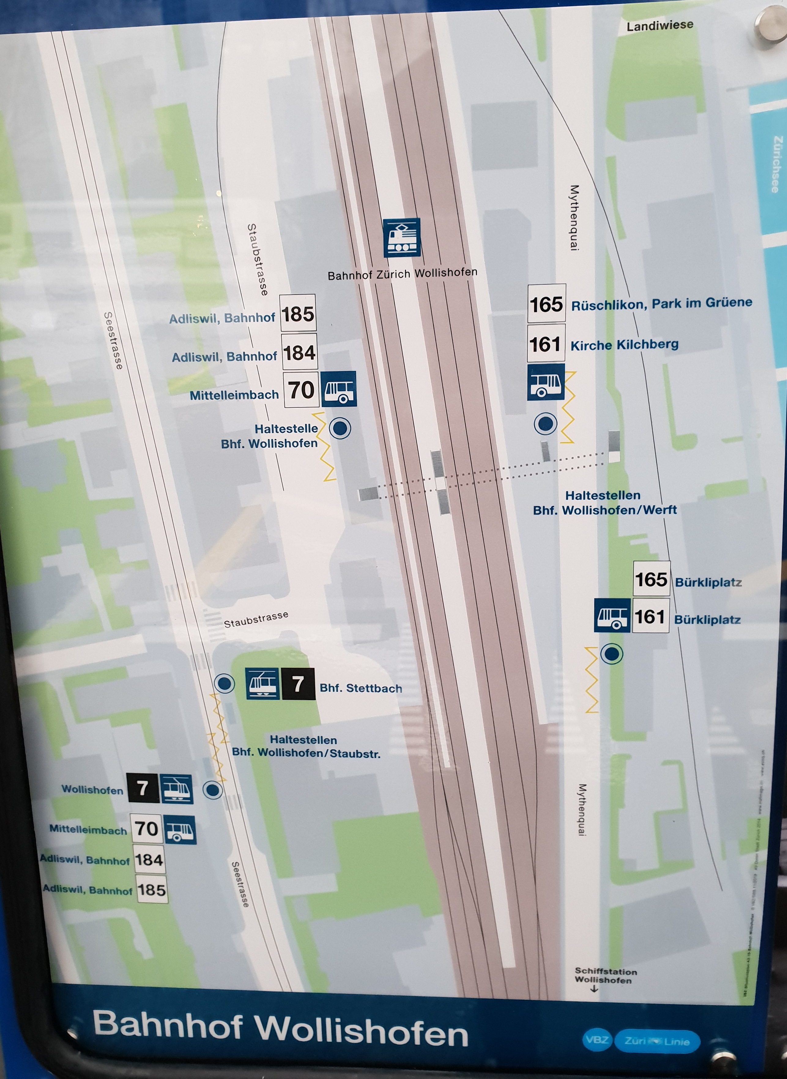 Karte mit Linien der VBZ am Bahnhof Wollishofen